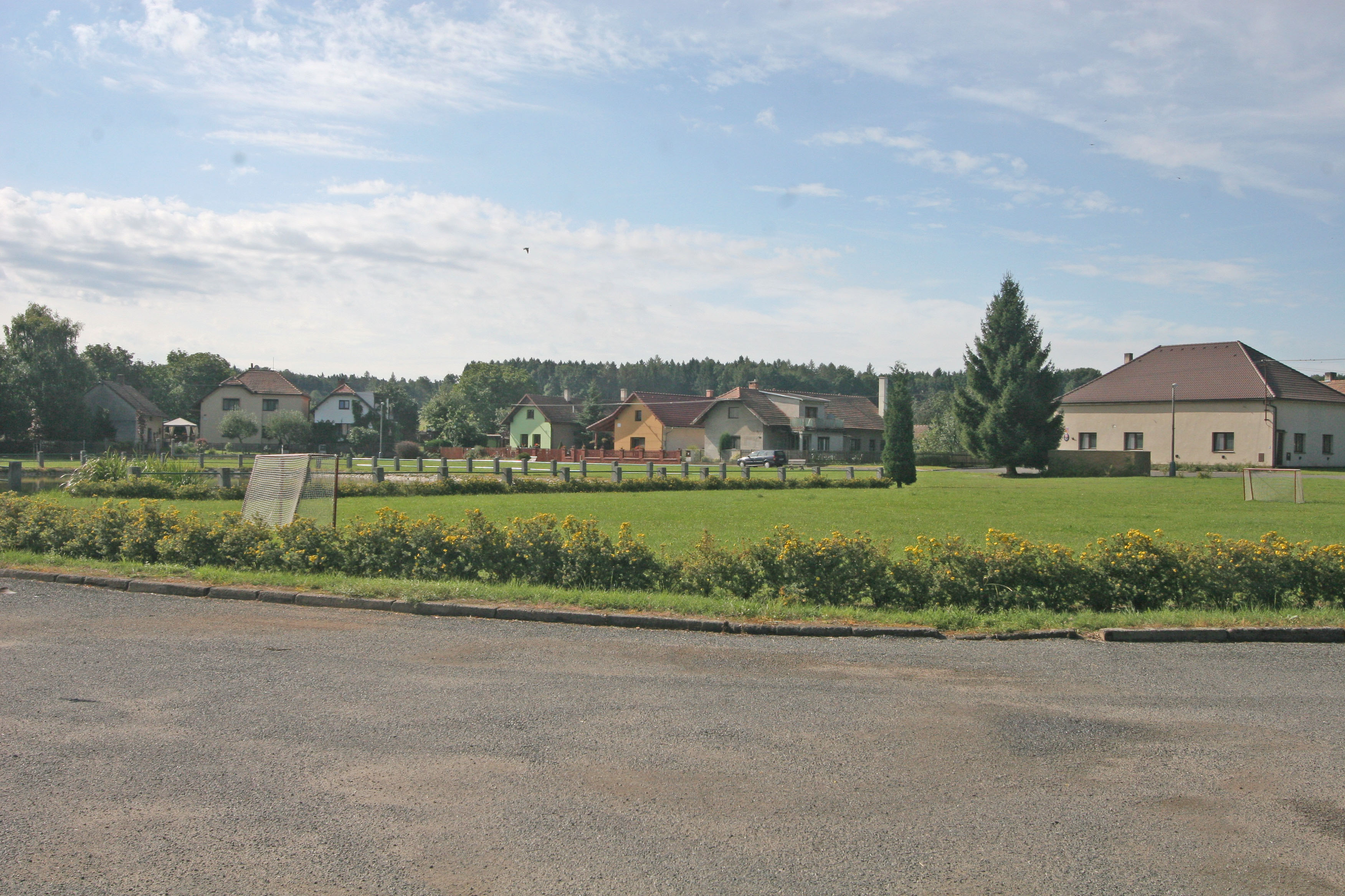 Urbanice náves